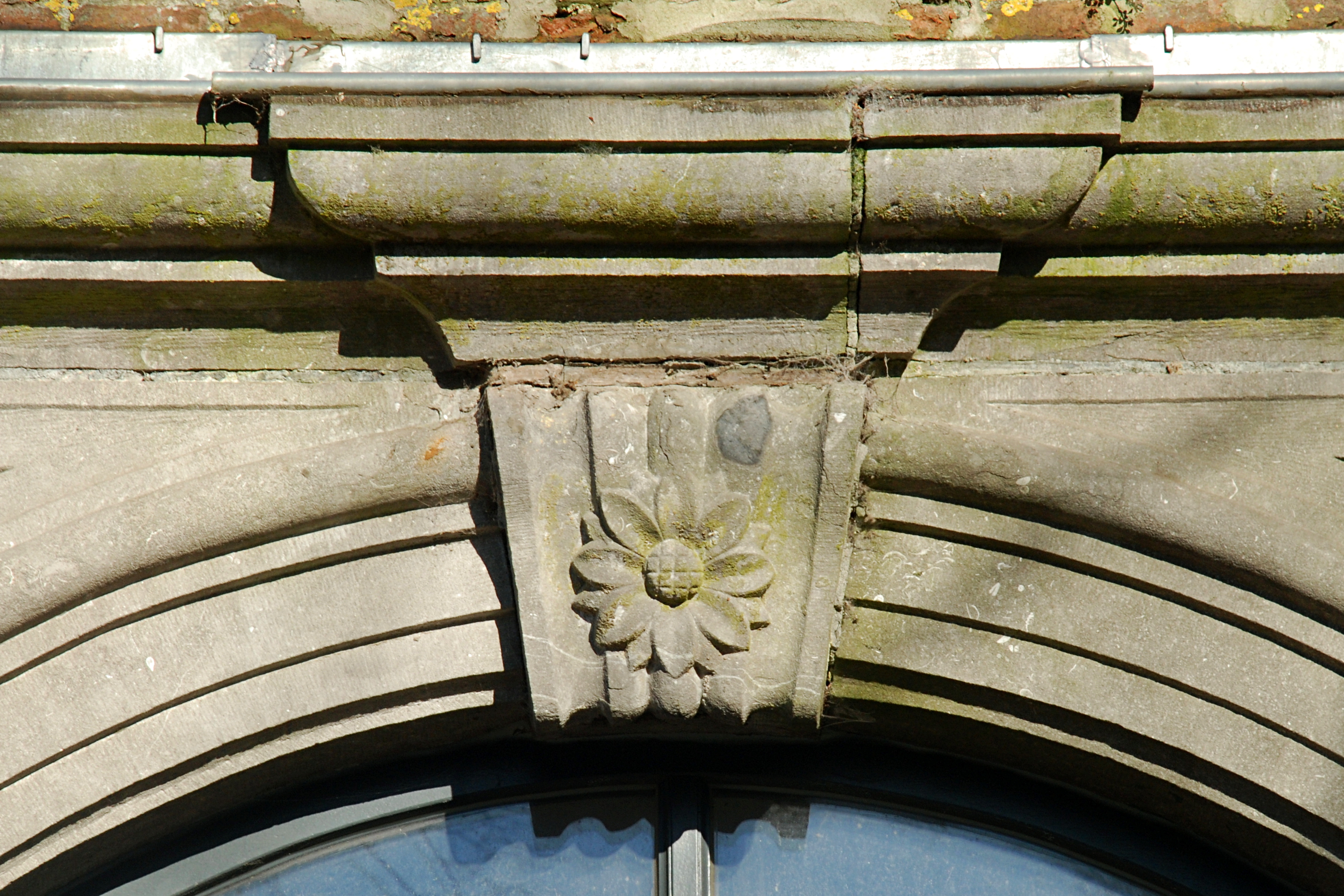 Belgique - Brabant wallon - Chastre - Église Sainte-Gertrude de Gentinnes